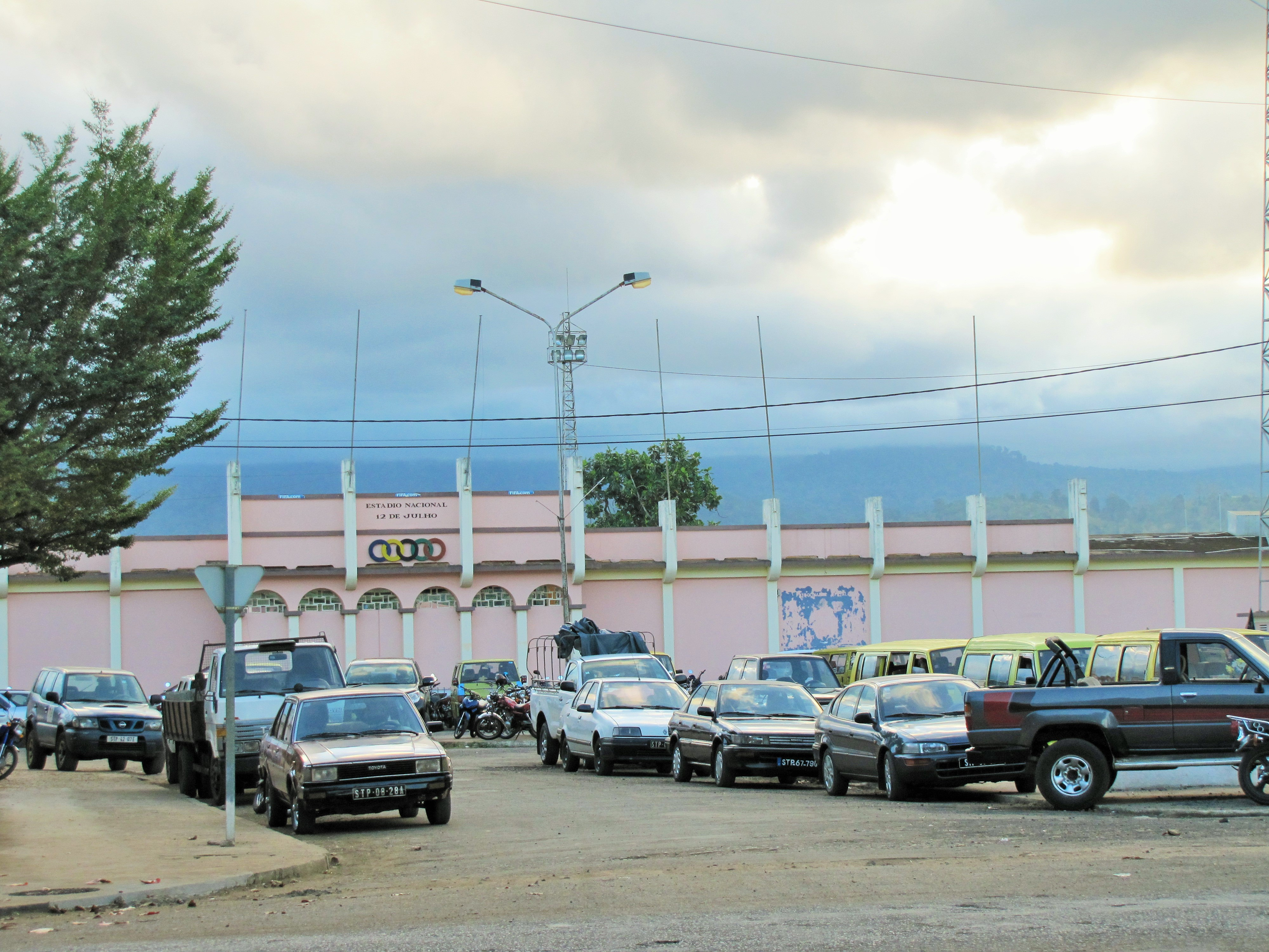 Estádio Nacional 12 de Julho, São Tomé National Stadium.